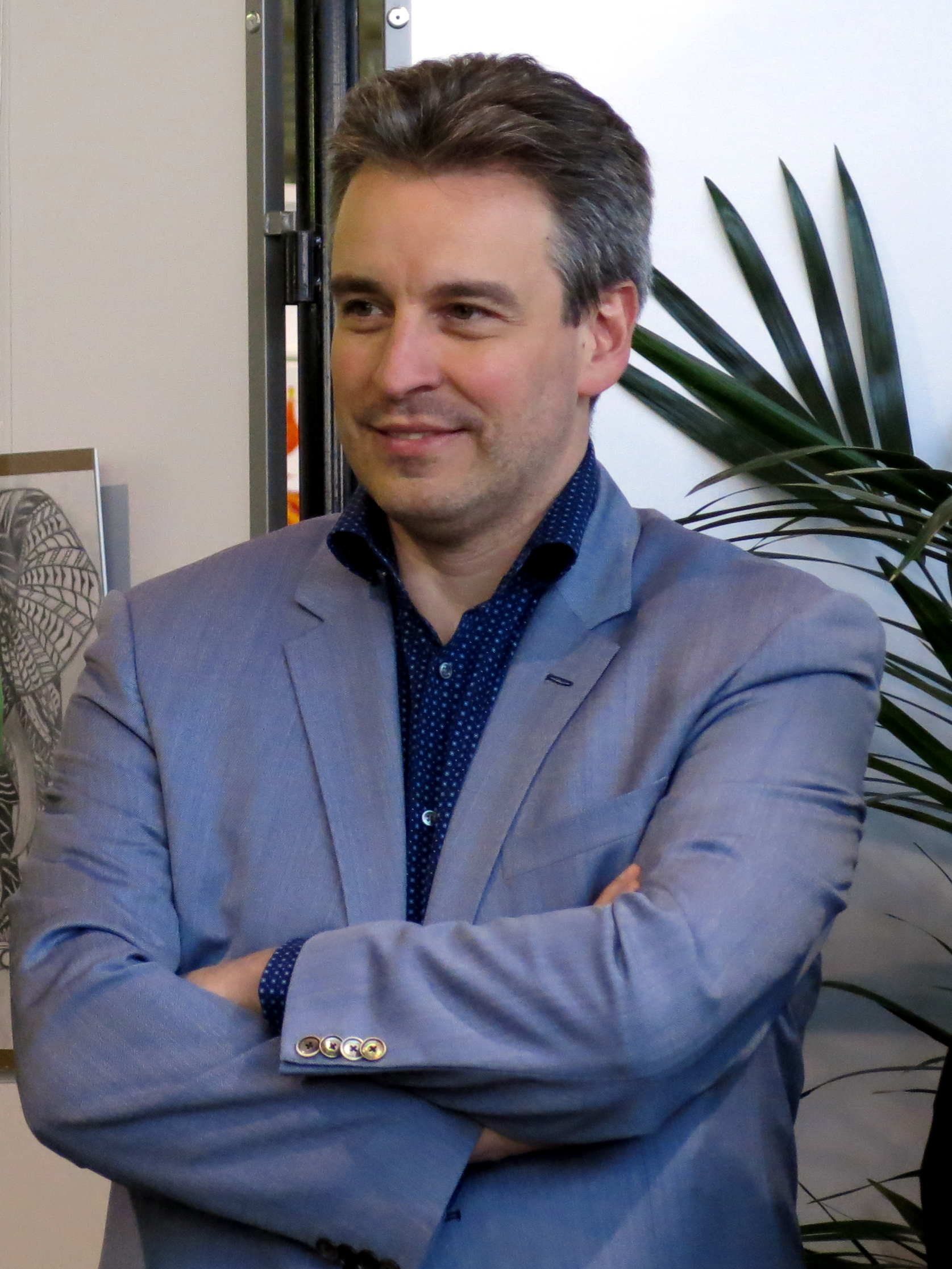 De Minister Claude Meisch beim Vernissage vu "Jukowo Jugendkonschtwoch 2014", am 1535°C zu Déifferdeng.